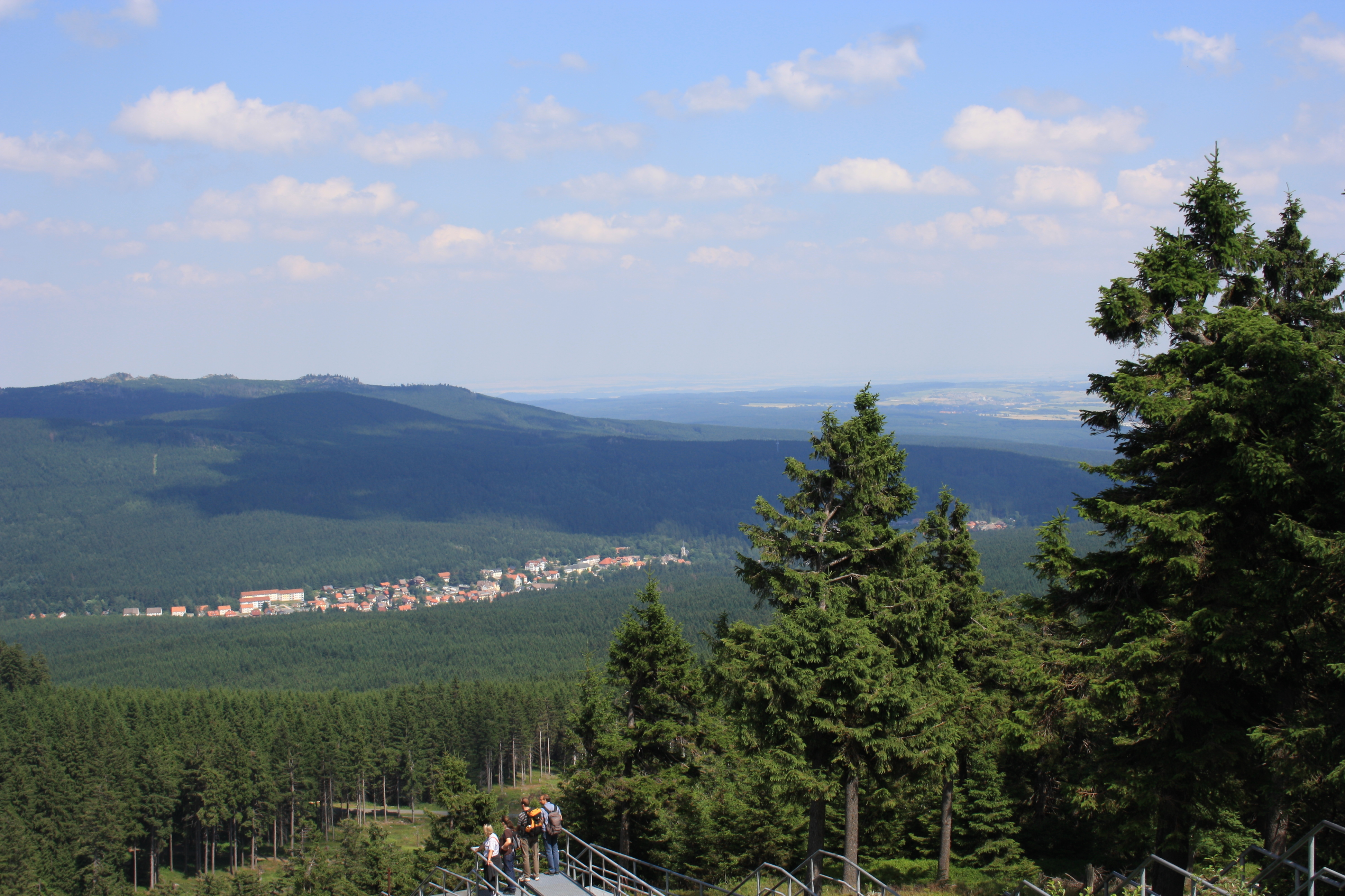 Harzwanderung Oberharz um Braunlage - Wurmberg - Weg nach Braunlage -Wurmberg- Blick nach Schierke vom Wurmberg